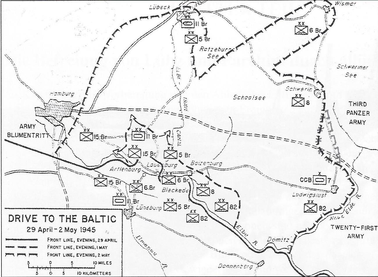 Besetzung Schleswig-Holsteins und Mecklenburgs durch die Alliierten